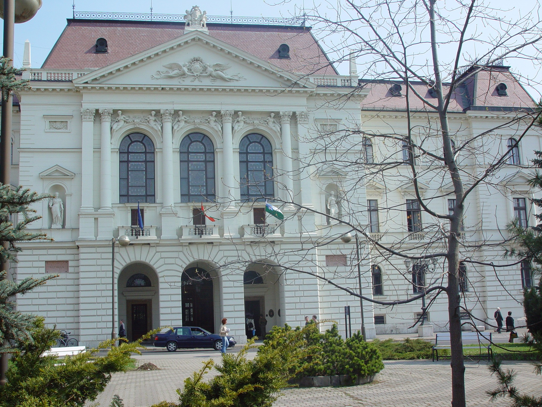 A Megyeháza Veszprémben